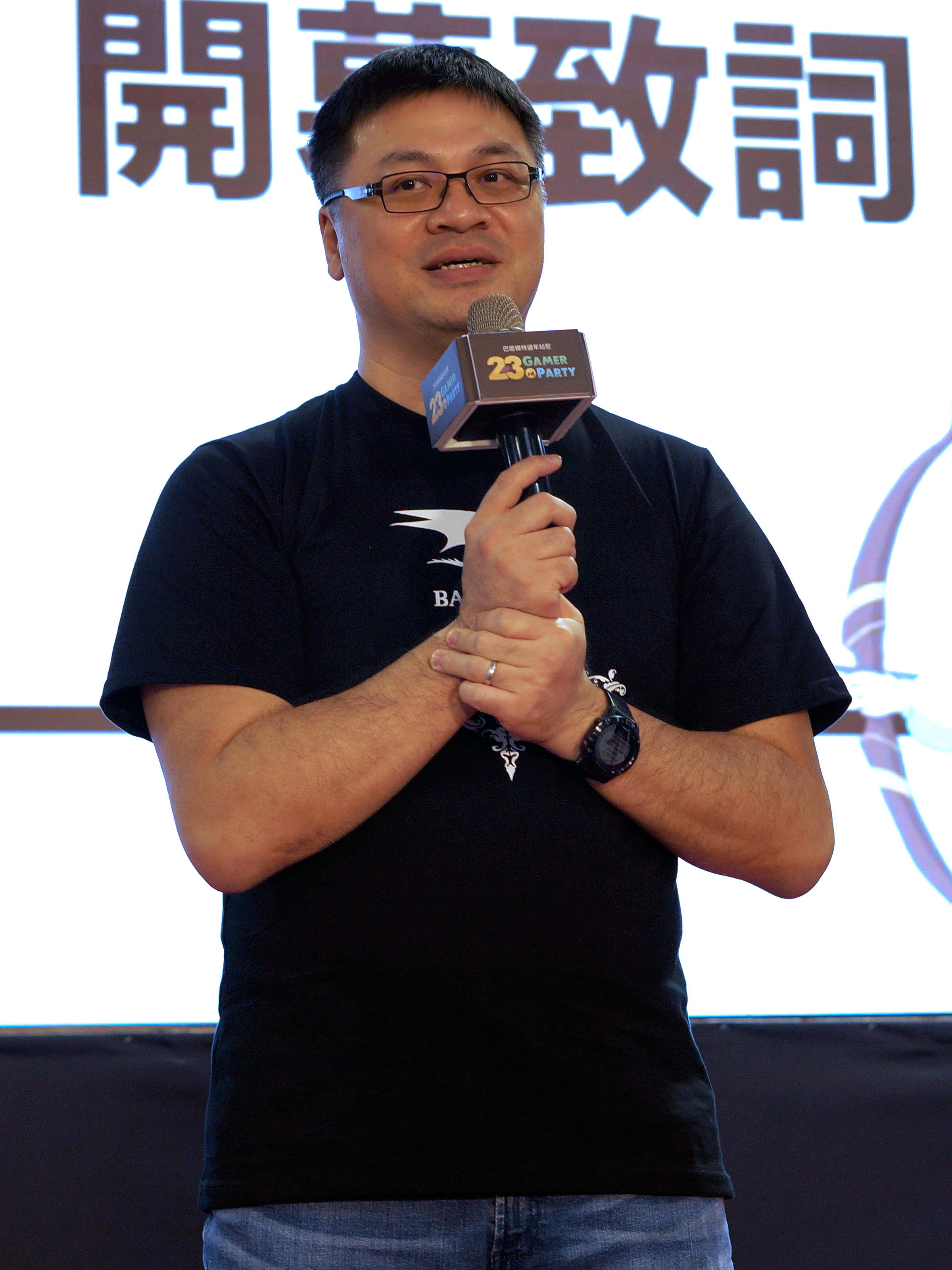 巴哈姆特電玩資訊站23週年站聚開幕，站長陳建弘致開幕詞。